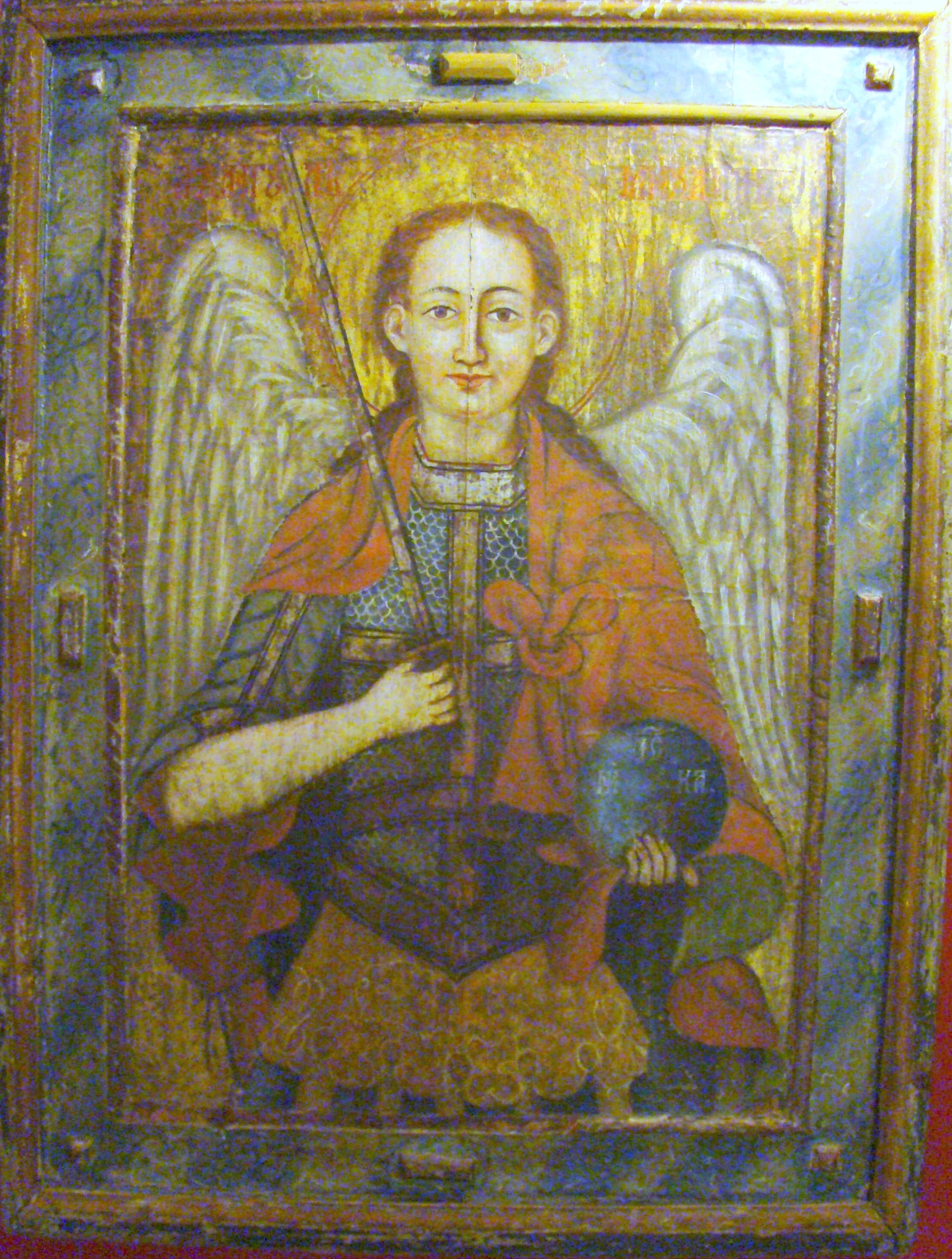 Icoană care a aparținut bisericii de lemn din Rebrișoara